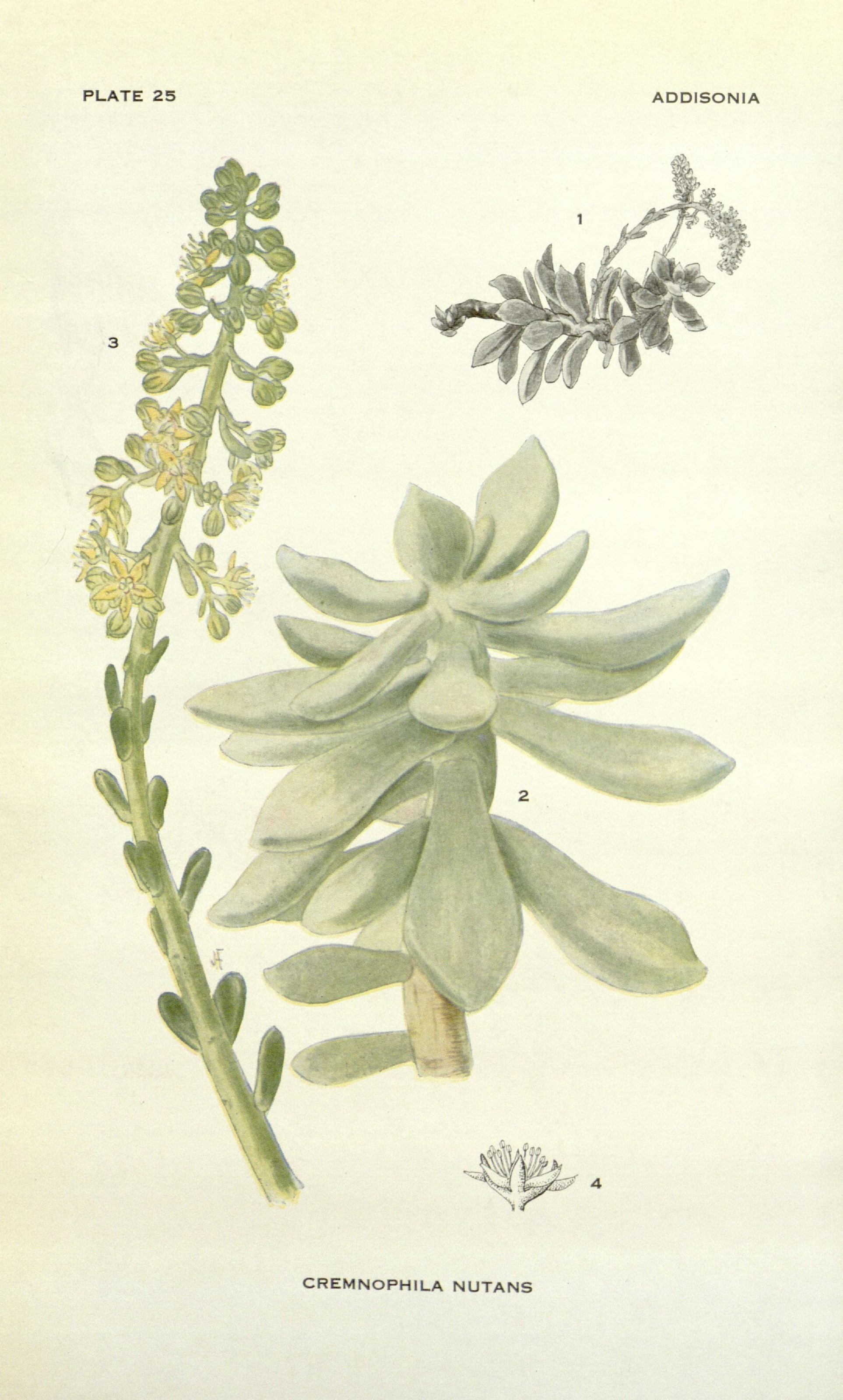 ADDISONIA